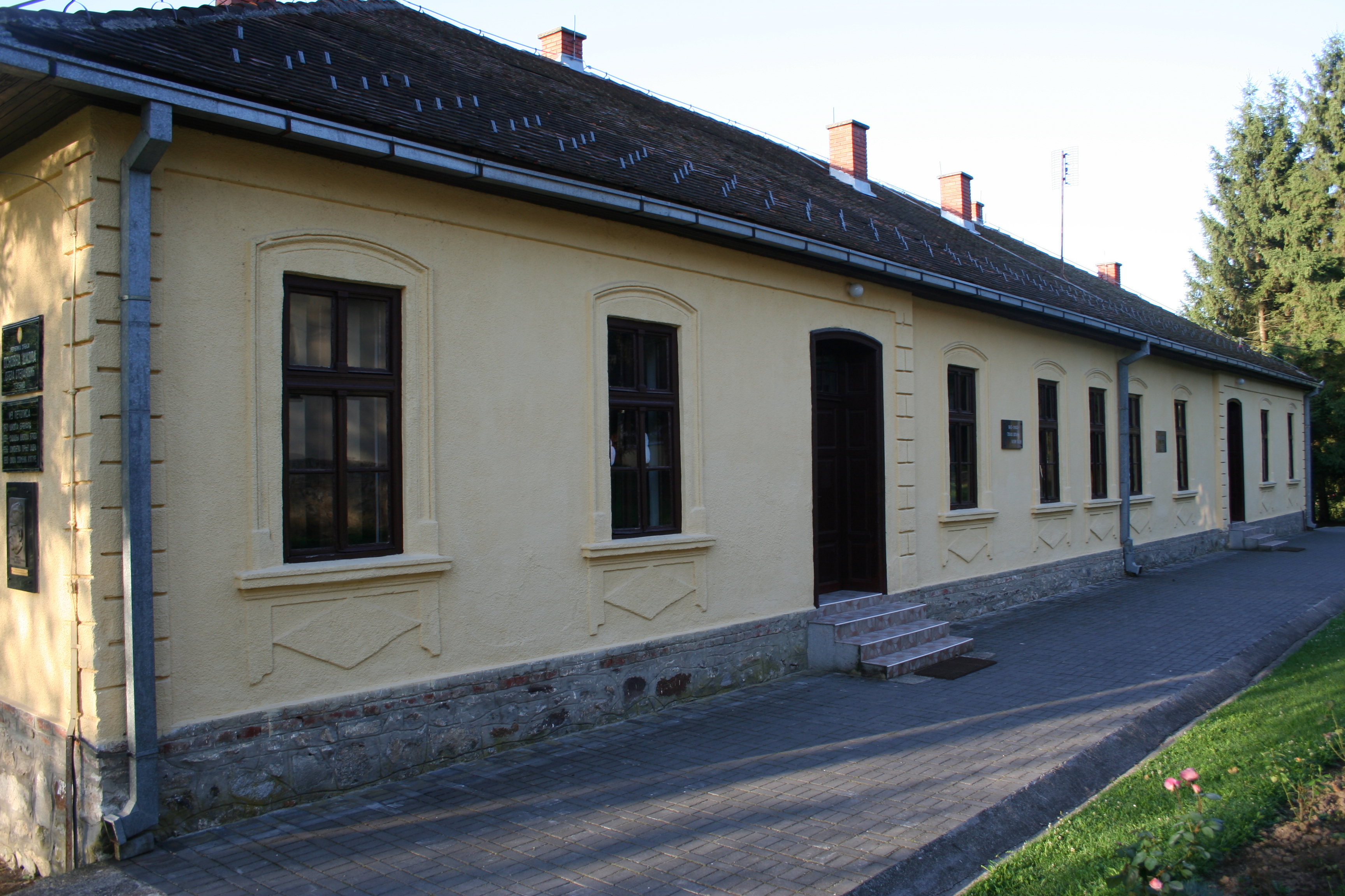 OŠ "Stepa Stepanović" Tekeriš